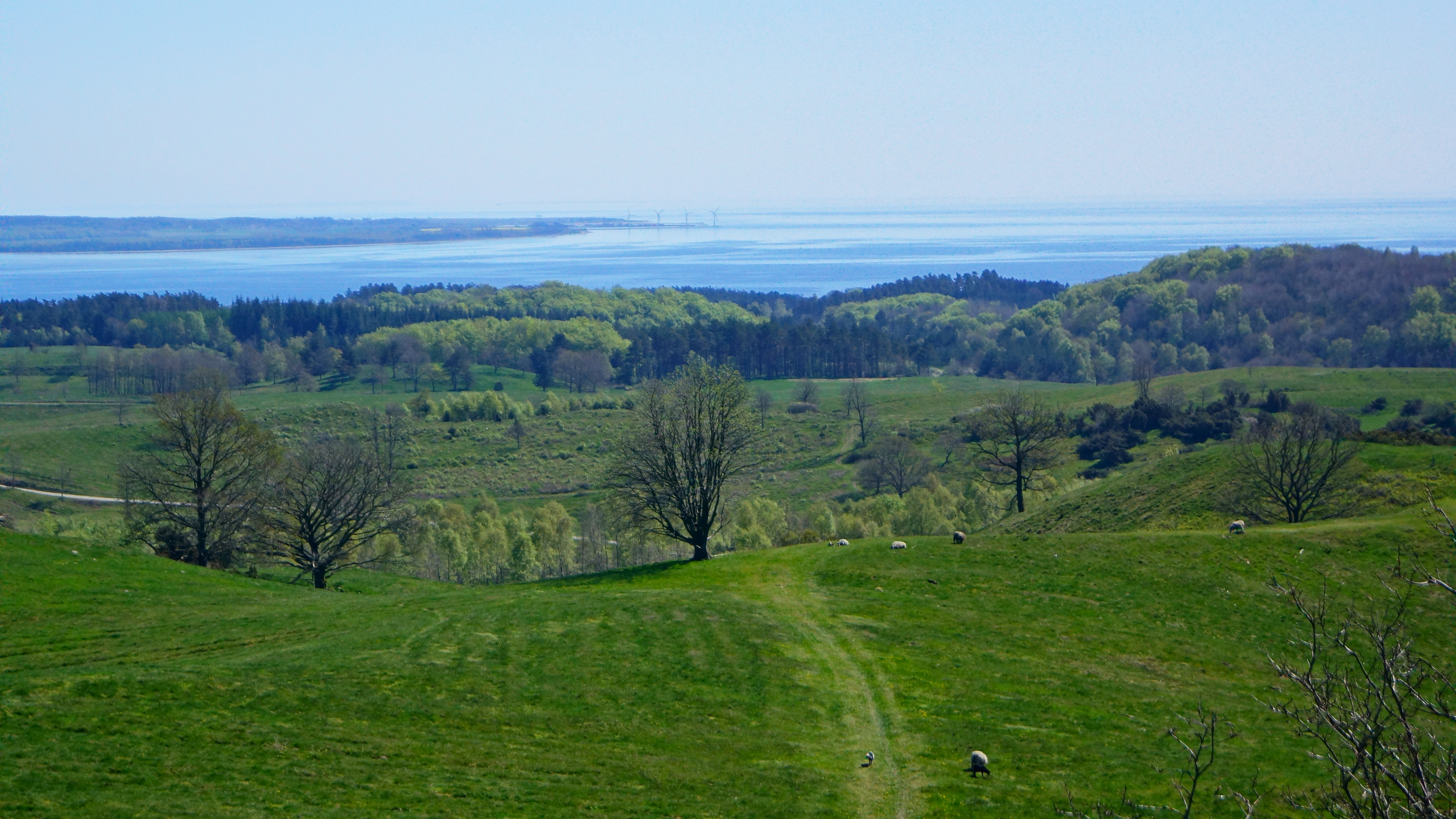 Udsigt fra Agri Bavnehøj ned over Ebeltoft Vig, retning øst.